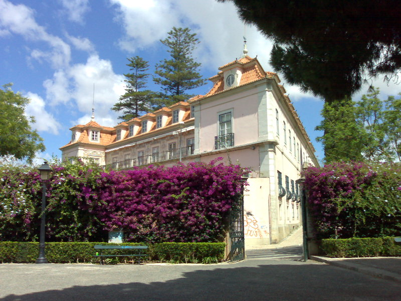 Palácio do Marquês de Pombal, em Oeiras, em Portugal. Palácio do Marquês de Pombal, a palace in Oeiras, Portugal.